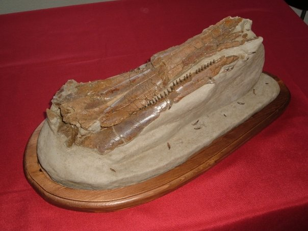 Etruridelphis giulii esposto presso il Museo GAMPS (Gruppo Avis Mineralogia Paleontlogia Scandicci)